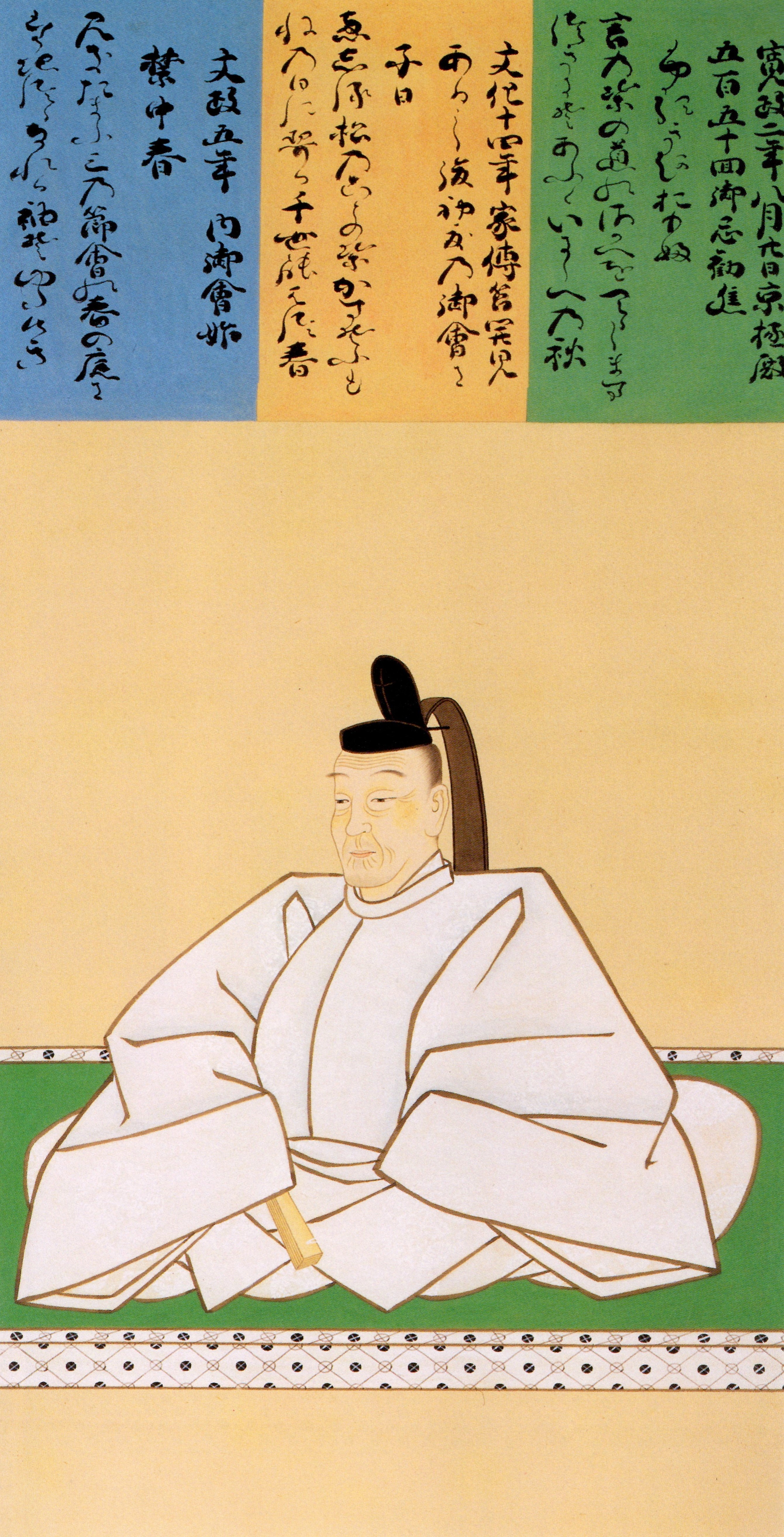 冷泉為章の肖像。